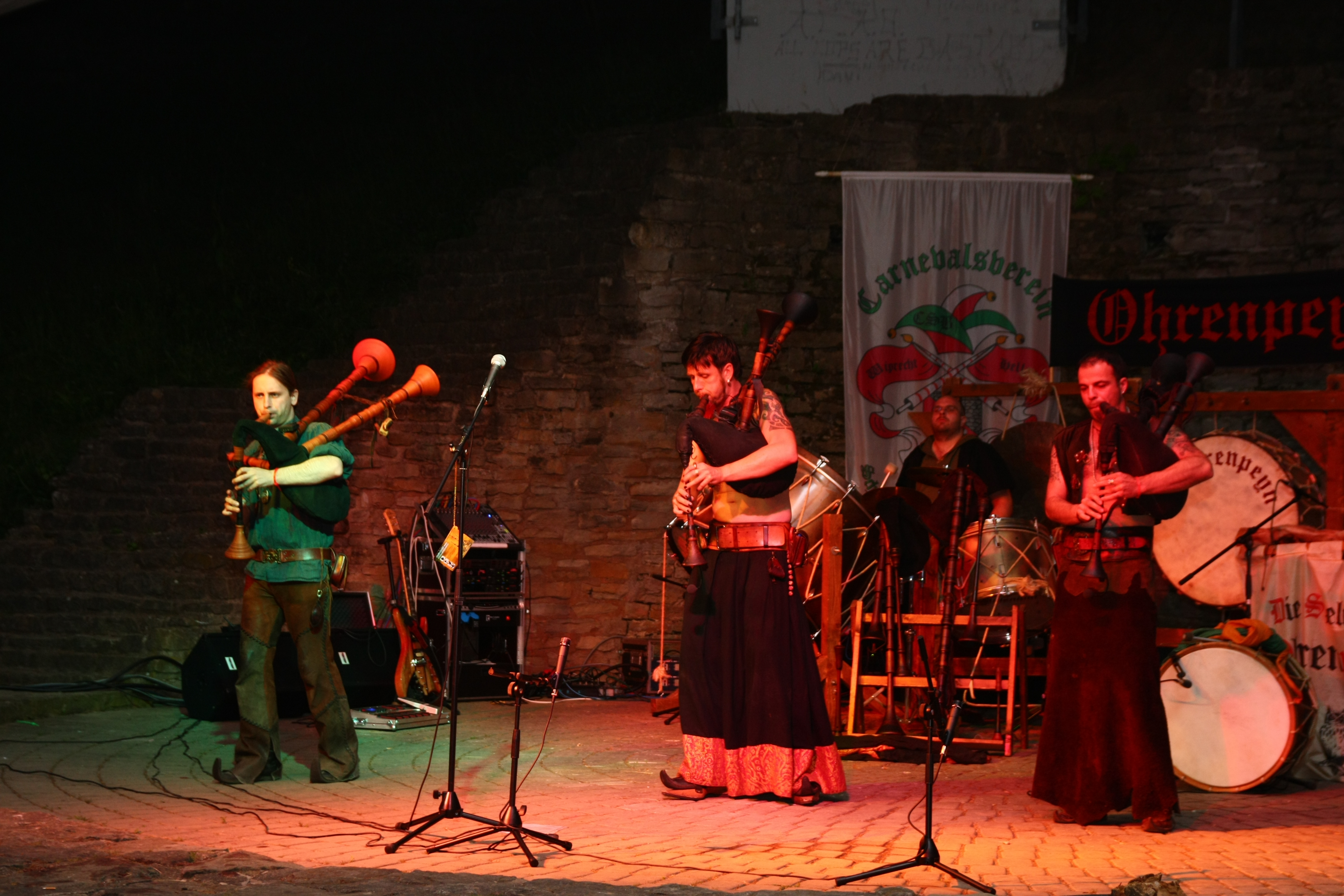 10. Burgfest in Groitzsch auf der Wiprechtsburg. Die Wiprechtsburg ist die ältesten, bislang bekannten aus Stein gebaute Burg.